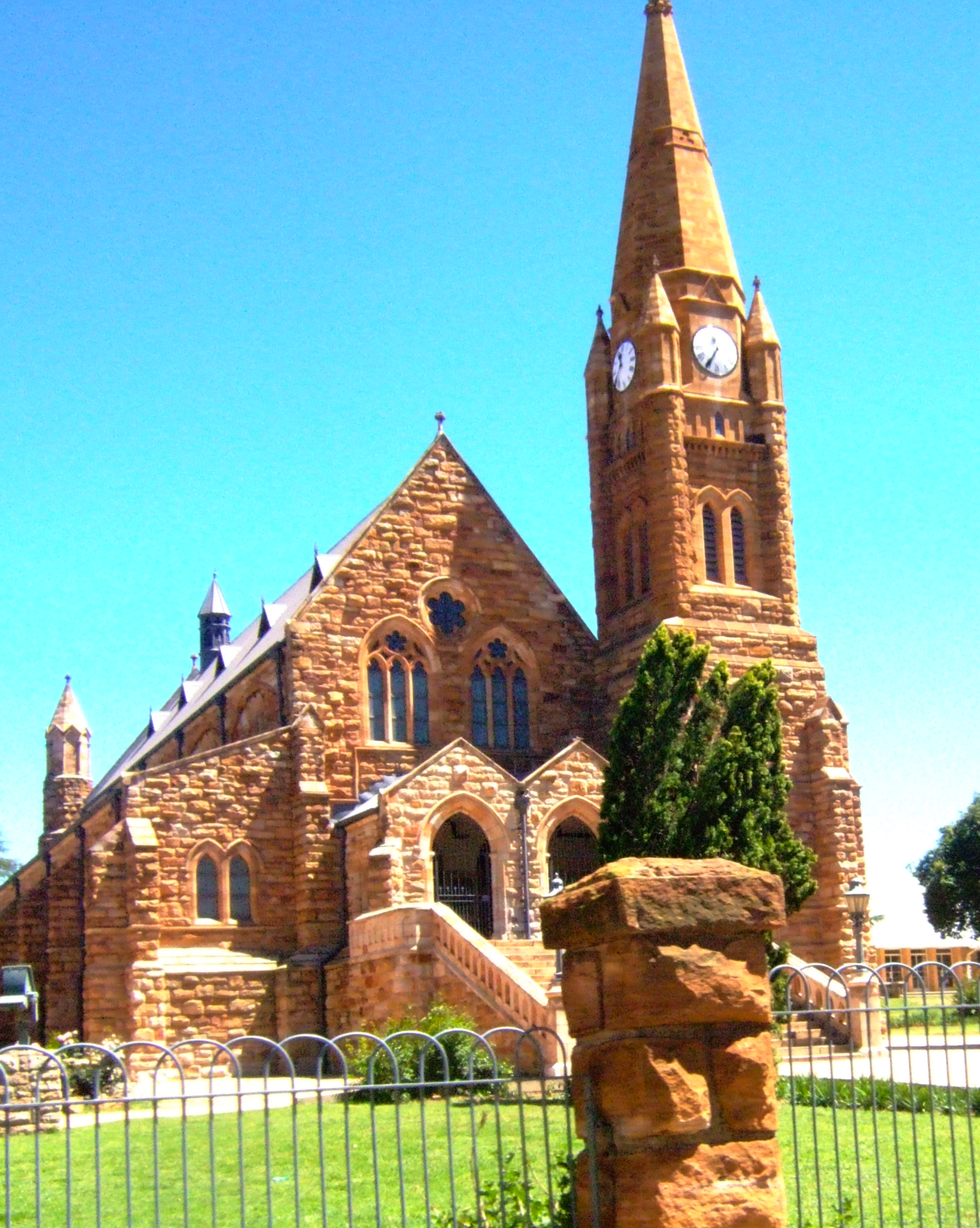 Klipkerk-Heidelberg-Gauteng-SouthAfrica-Summer2007